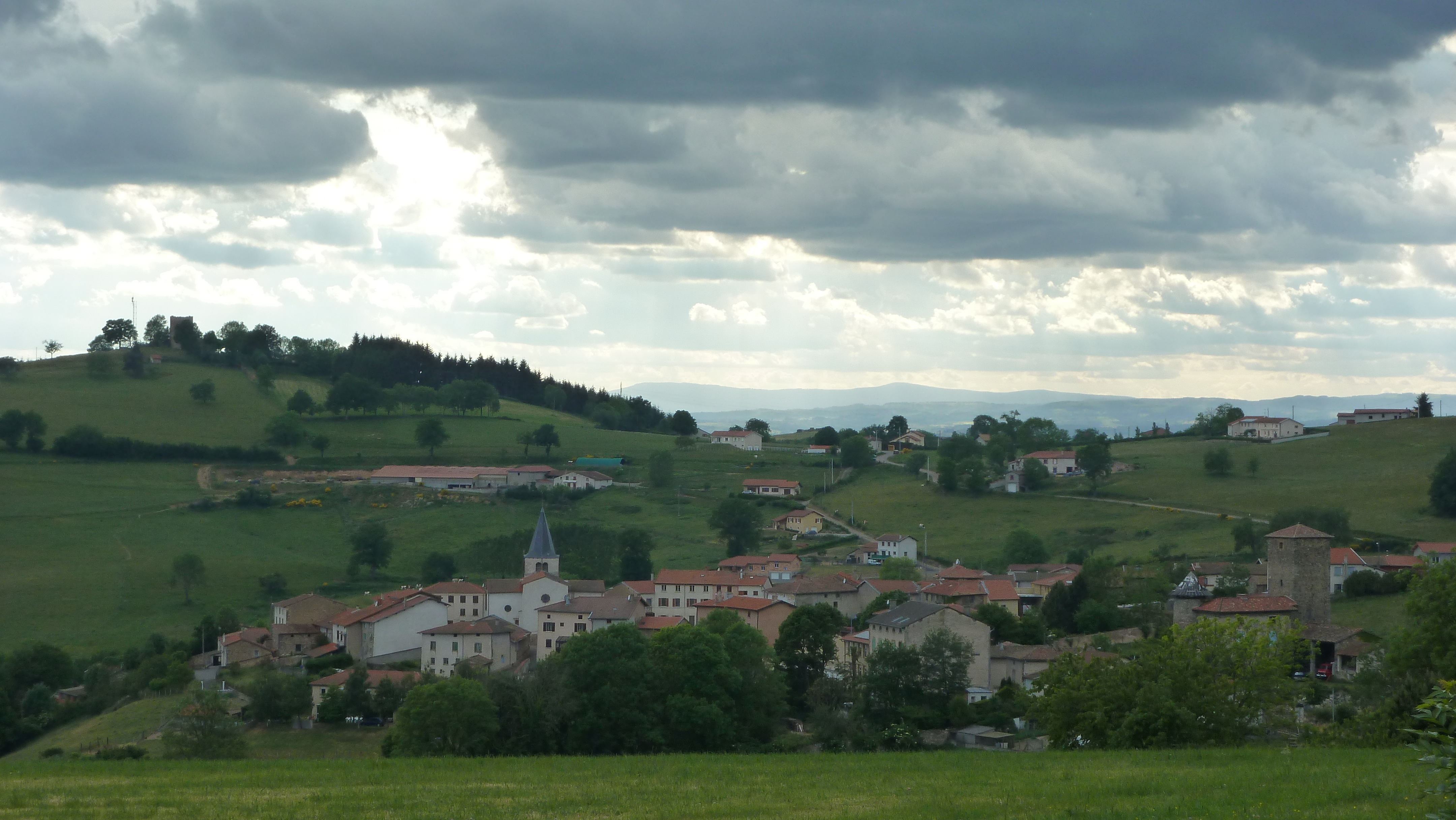 Vue sur Saint-Cyr-de-Valorges (Loire) - Le bourg, le château de l'Espinasse et la tour de Ressy.